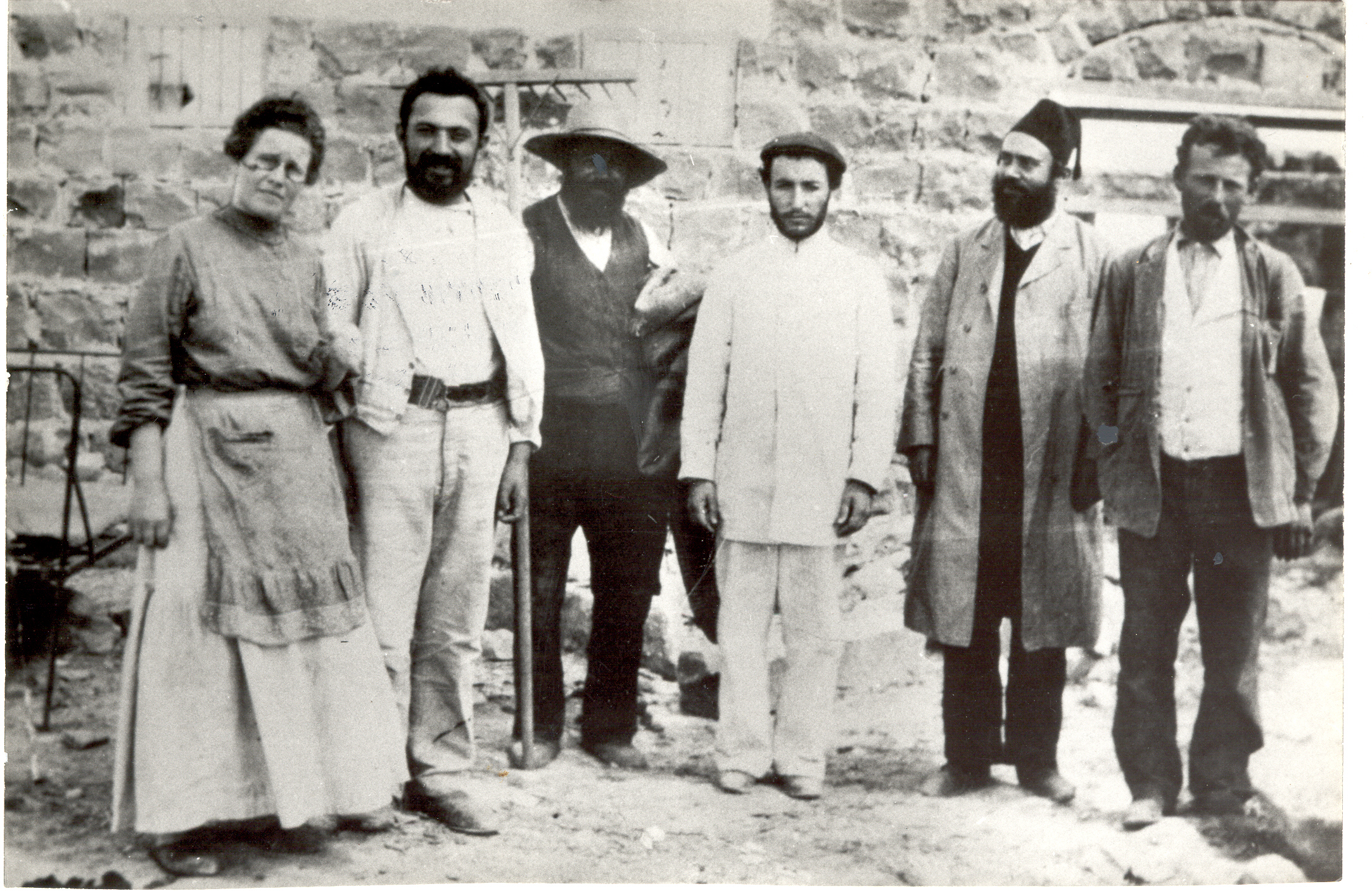 משה ברמן עם ראשוני חצר כינרת. מימין: מרדכי קצפ, משה בקר, צבי יהודה , ר' בינימין , משה ברמן ,שרה מלכין